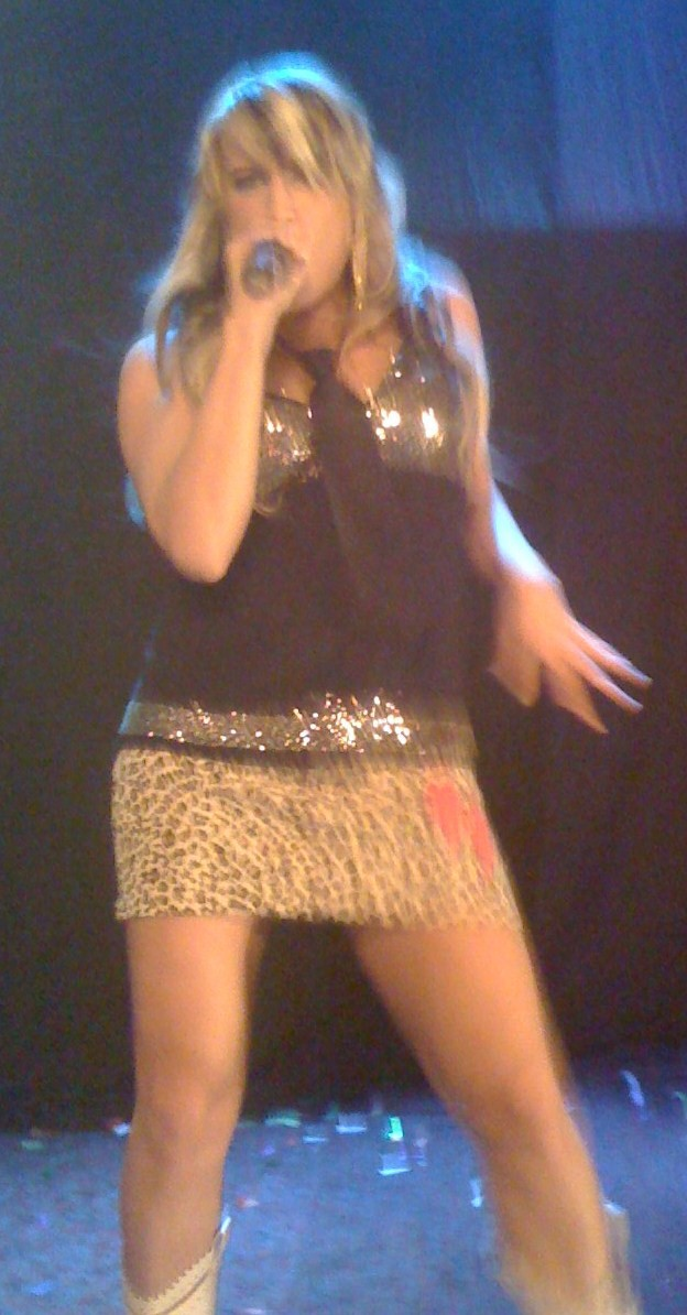 Natalie Horler (Cascada Singer)